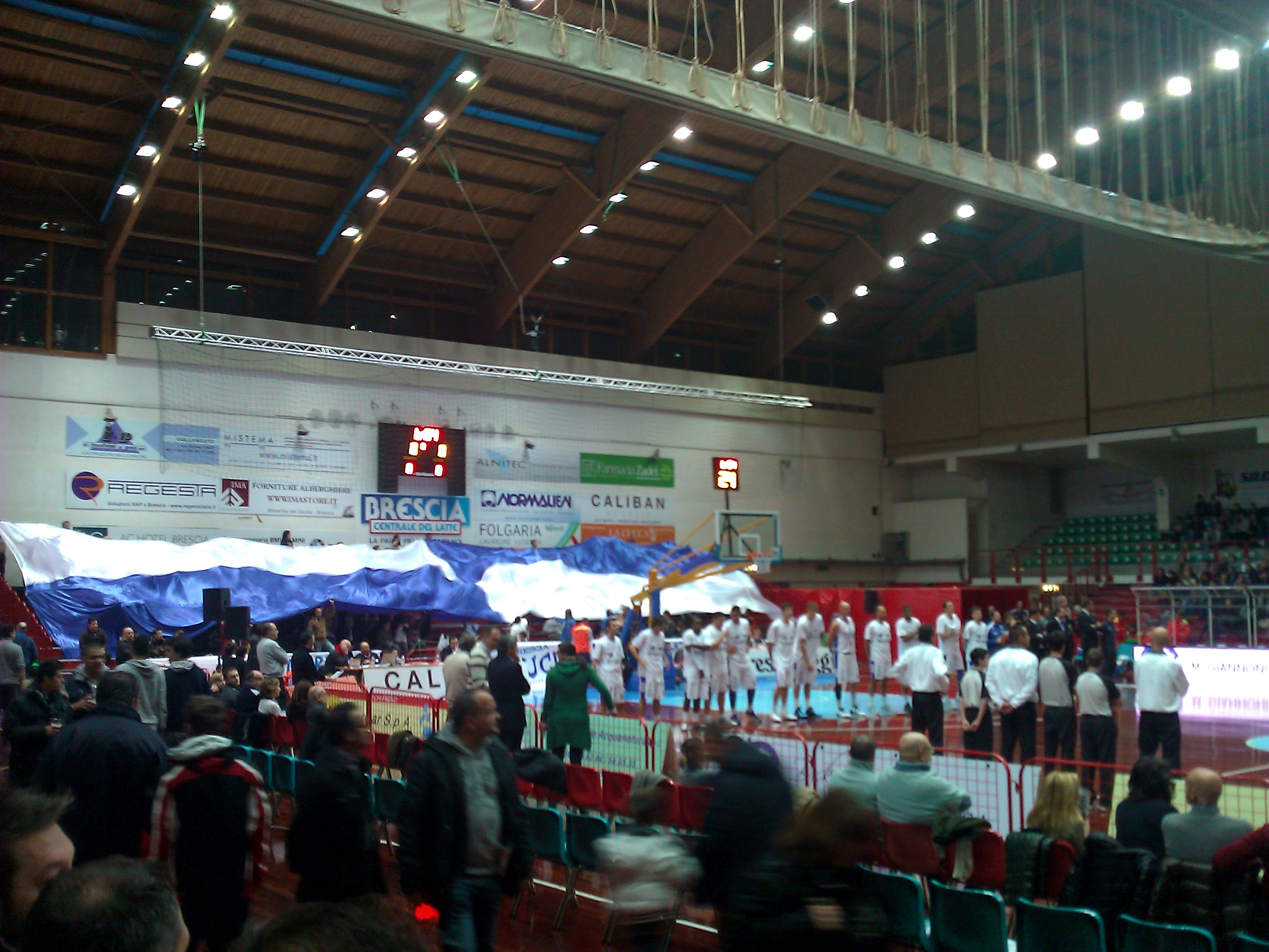 Coreografia durante una partita casalinga del Basket Brescia Leonessa durante campionato italiano di Legadue stagione 2011/12.